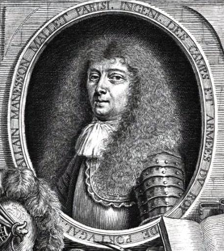 "Allain Manesson Mallet, parisi[en], ingéni[eur] des camps et armées du roy du Portugal". (Détail)